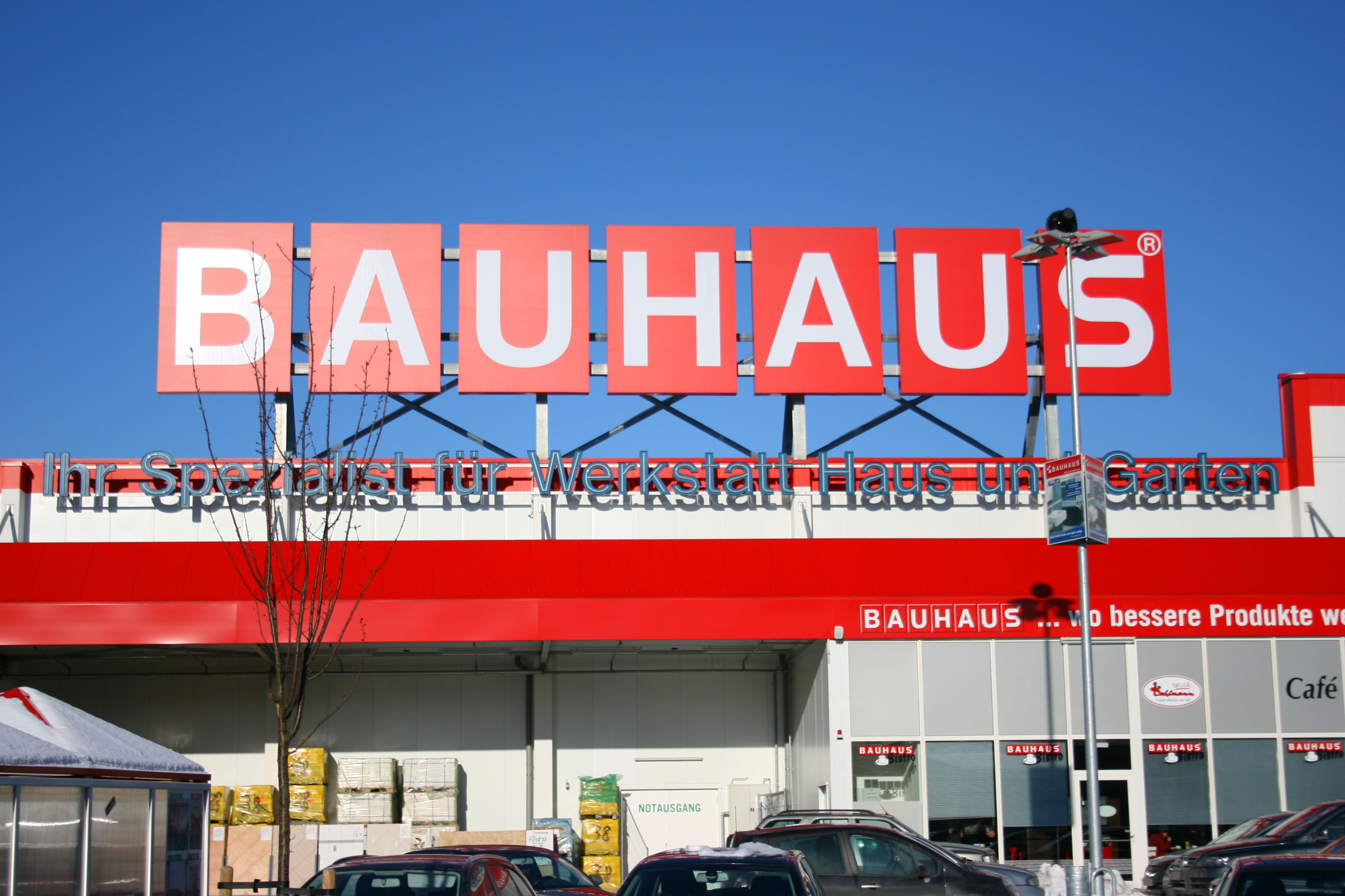 Bauhaus in Wuppertal